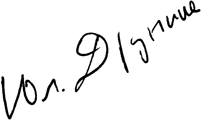 Юлия Друнина, подпись.